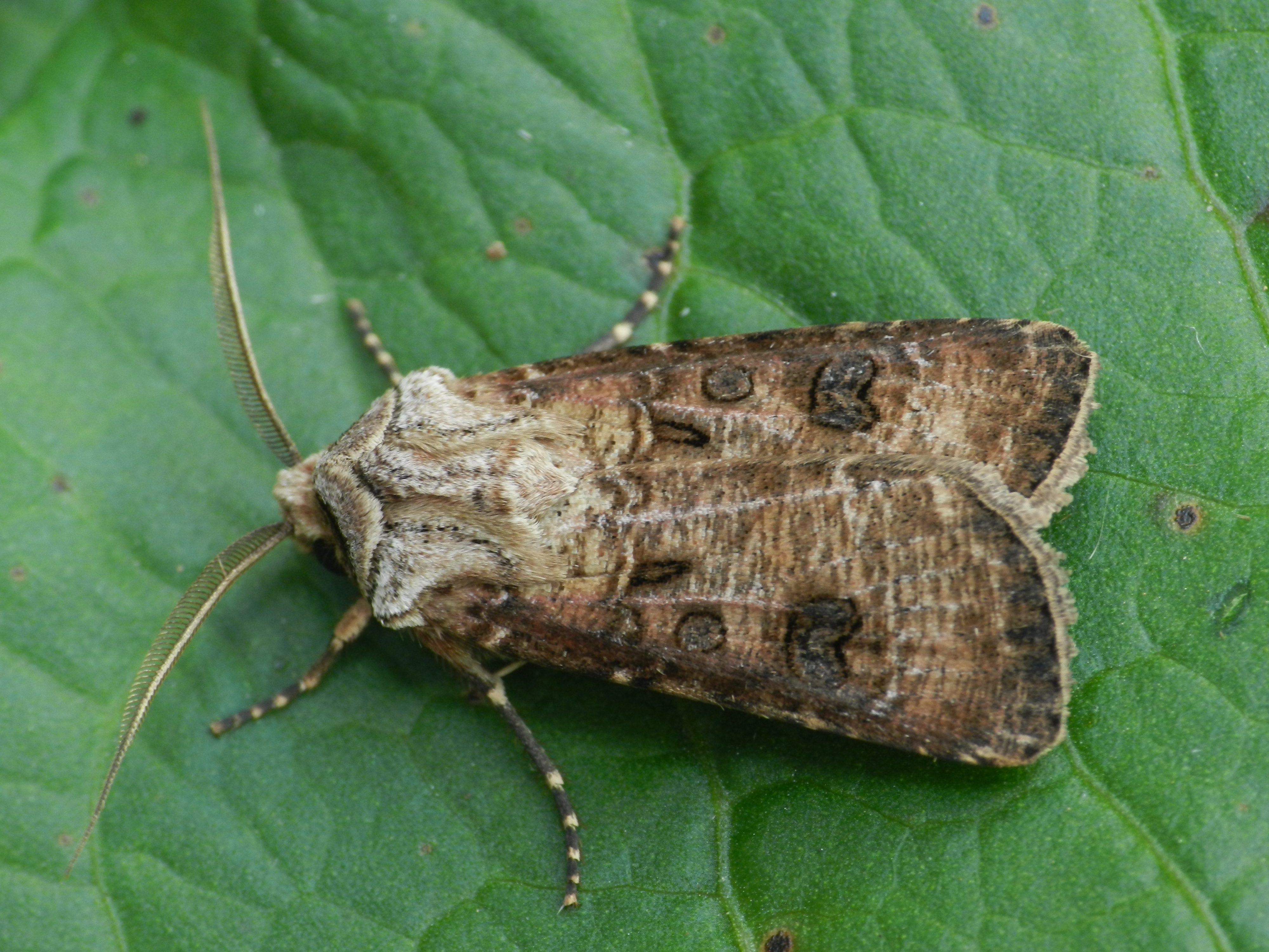 Agrotis clavis. Picture taken in Olsztyn, Poland.